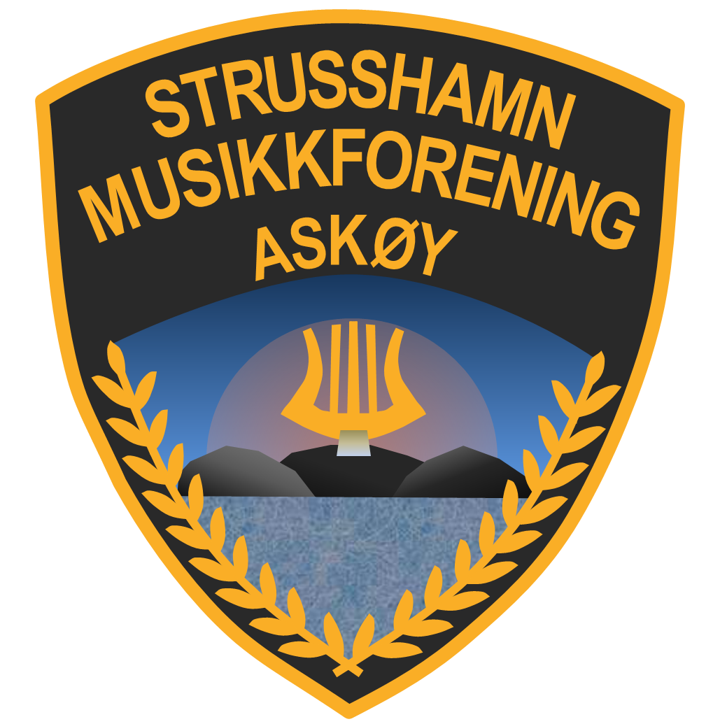 Strusshamn Musikkforening